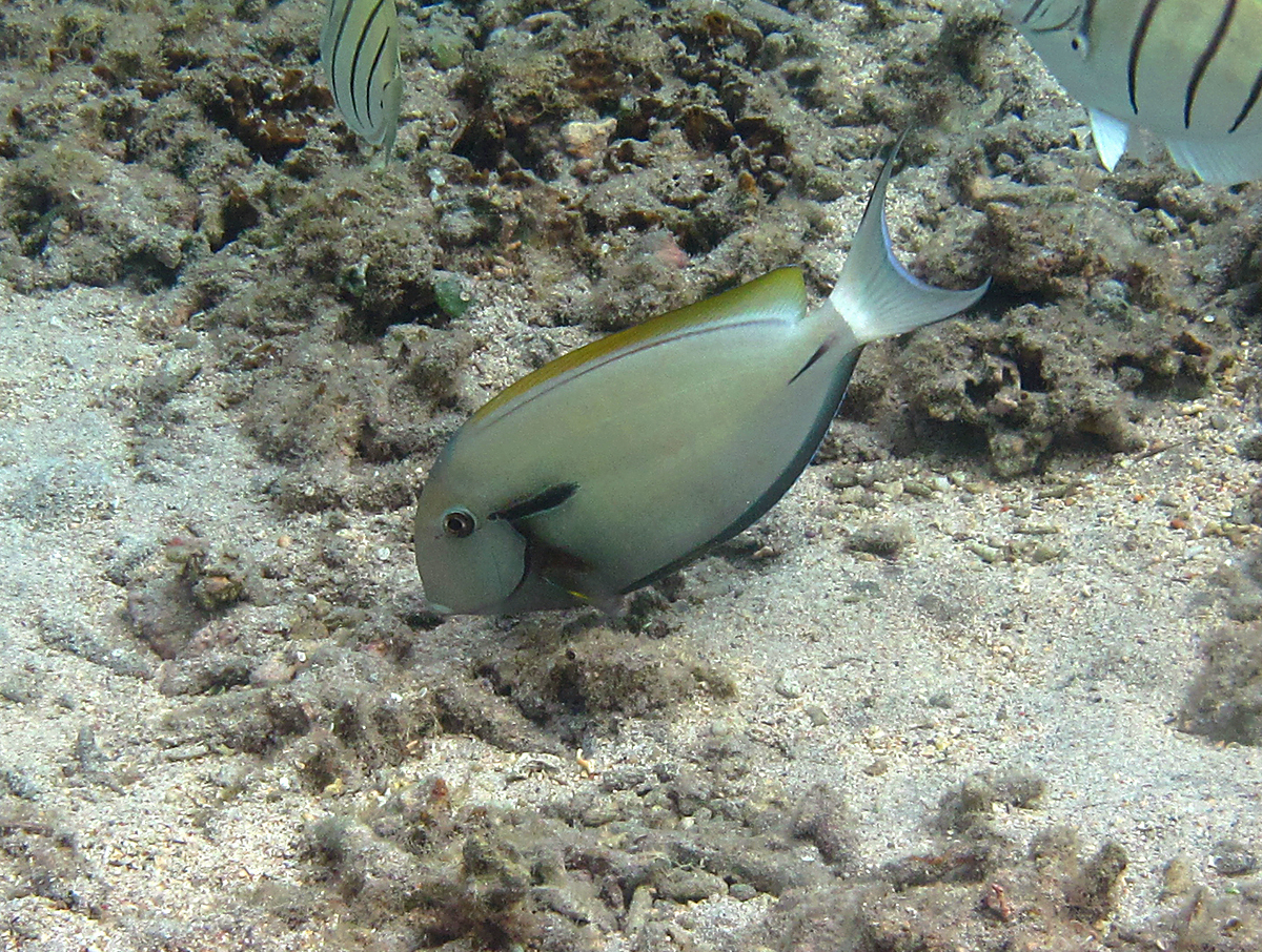 Un chirurgien à virgule noire (Acanthurus nigricauda) en livrée claire à la Réunion.